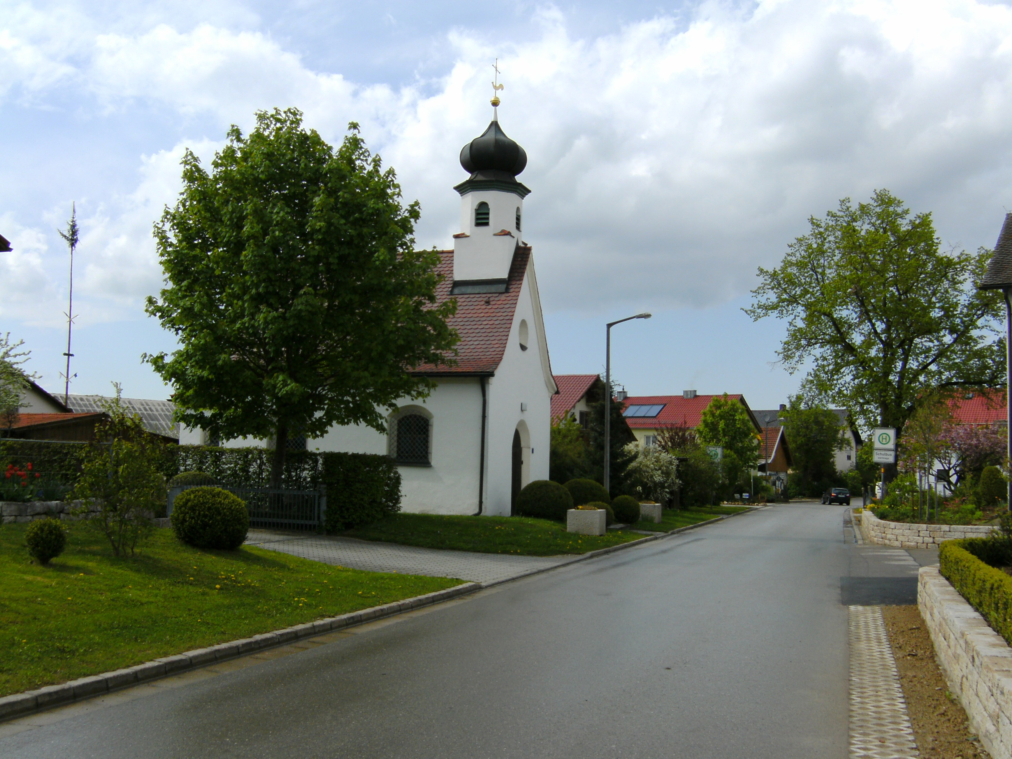 Buch, Ortsteil von Kipfenberg im Landkreis Eichstätt, Bayern